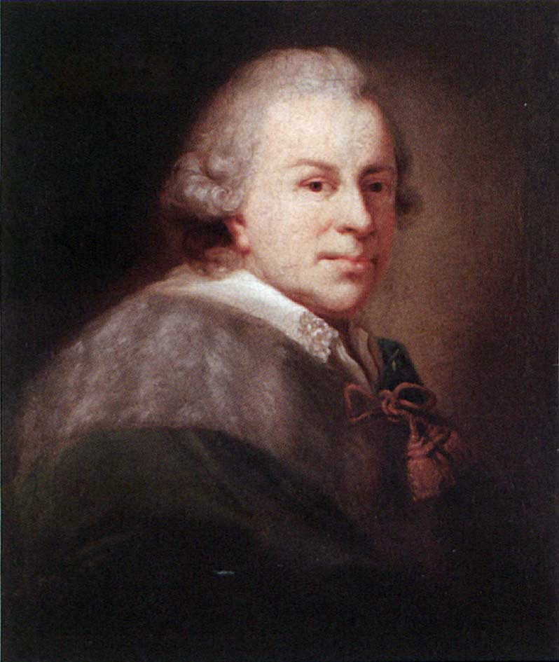 Беларуская (тарашкевіца): Партрэт Аляксандра Міхала Сапегі (Alaksandar Michał Sapieha) гербу «Ліс» (1730—1793), дзяржаўнага і вайсковага дзеяча Вялікага Княства Літоўскага, ваяводы полацкага, падскарбія надворнага, гетмана польнага і канцлера вялікага.